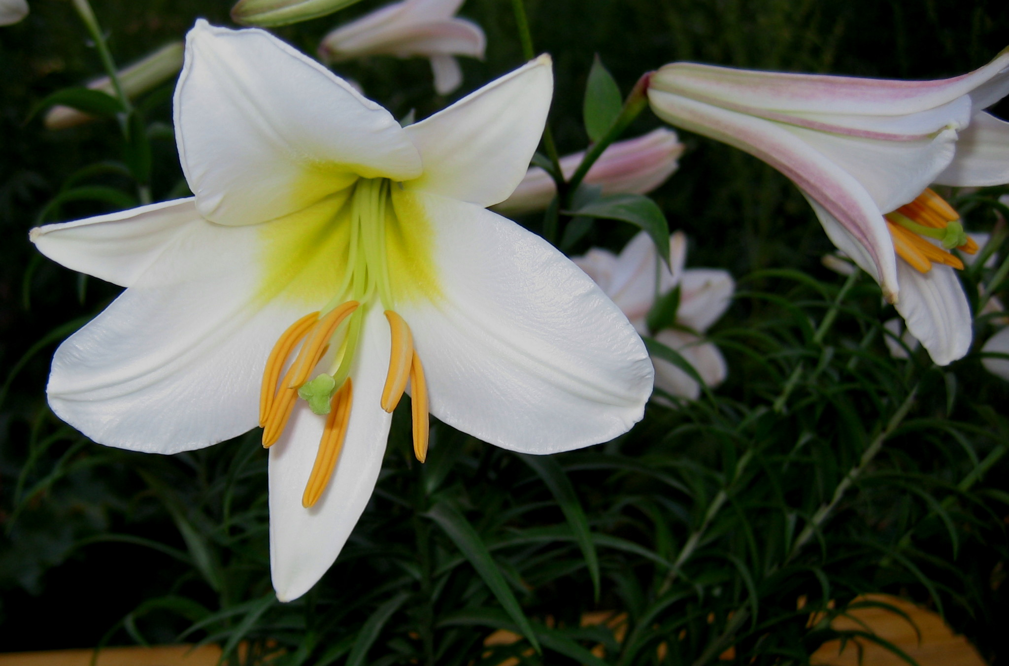 Lilium regale